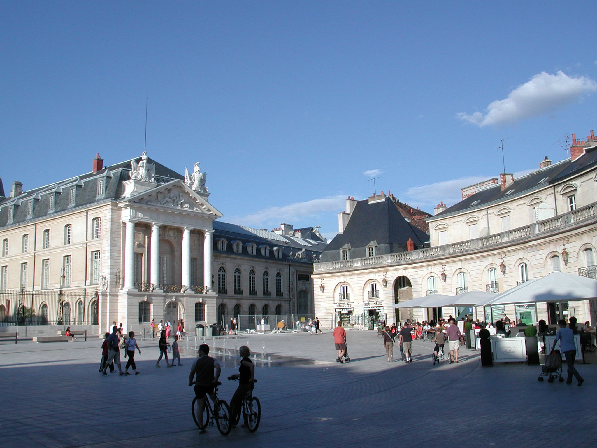 Dijon, France, palazzo dei duchi